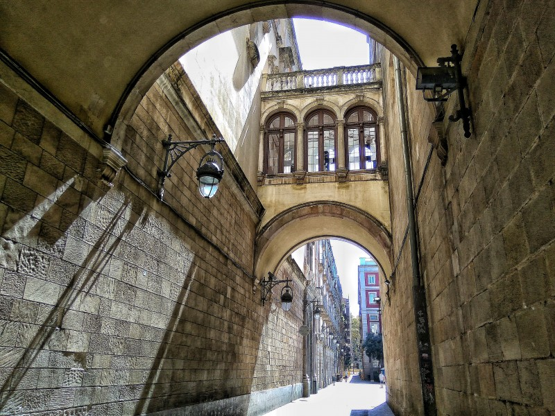 Carrer de la Mercè, Barcelona.